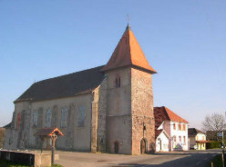 Eglise de Chaux (Territoire de Belfort, France) Photo prise par LP90 le 30/03/2004 License GFDL LP90